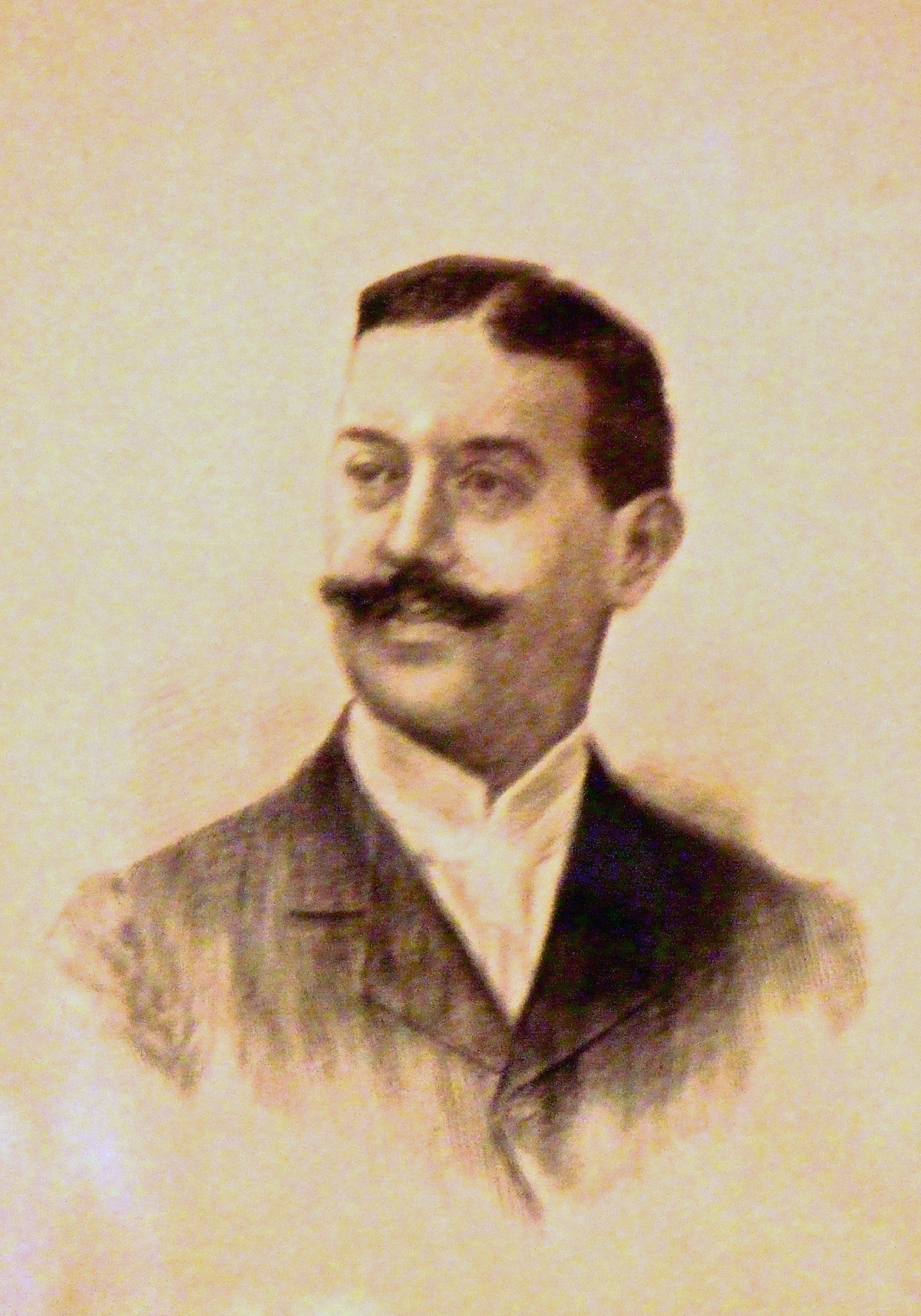 Portrait du bibliophile R. Descamps-Scrive (1853-1925)